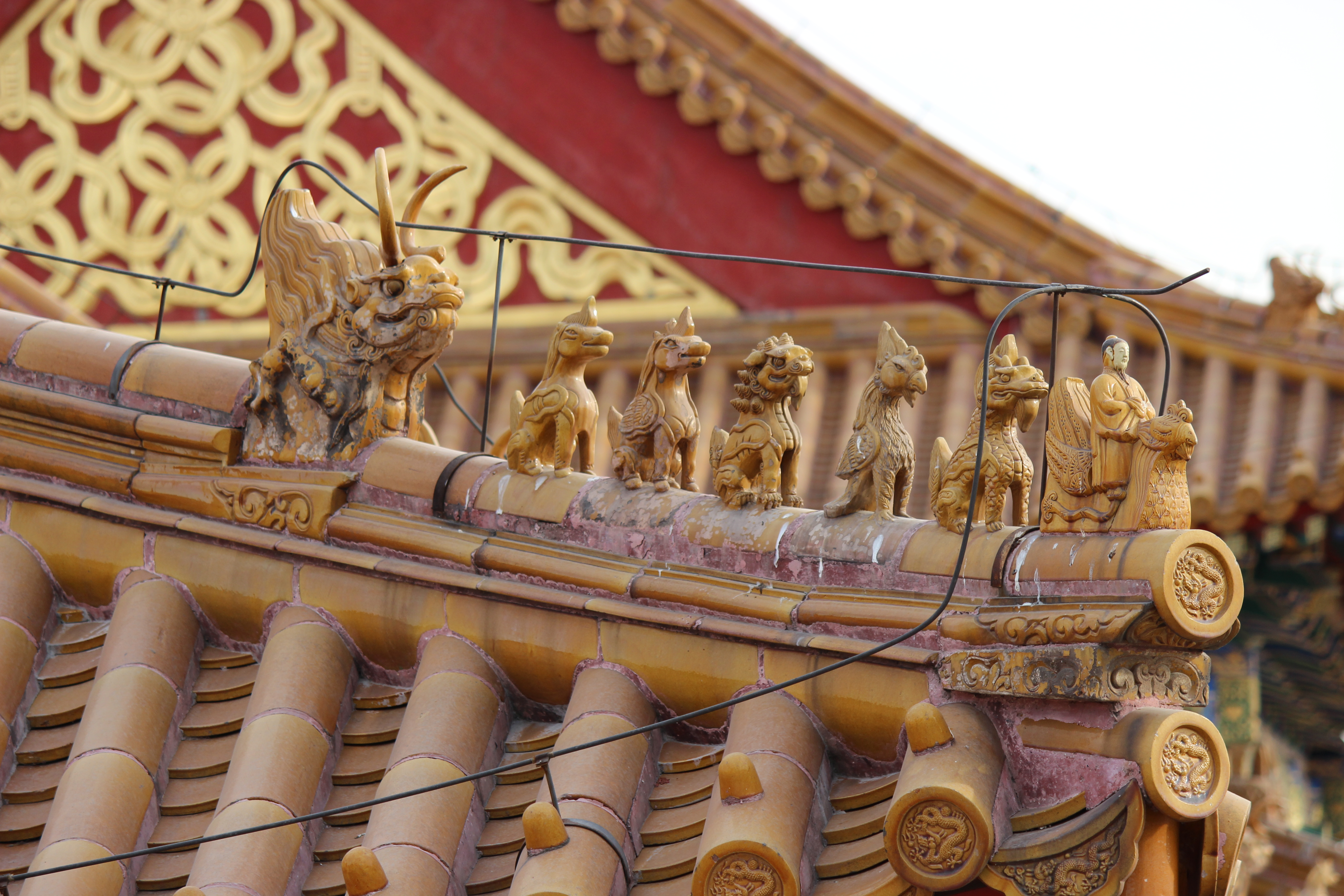 Beijing China